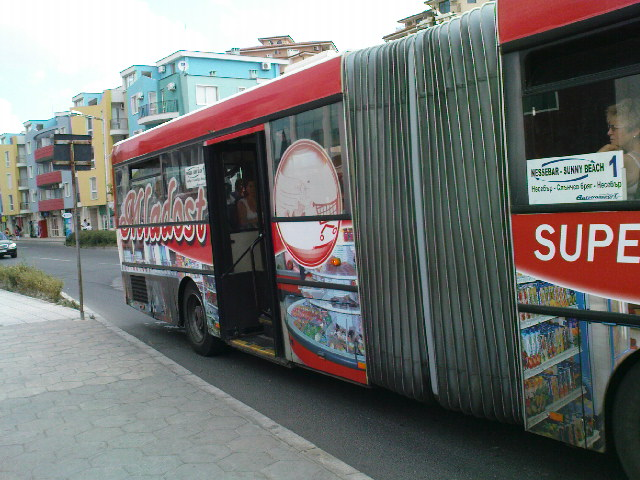 задній вагон O405G